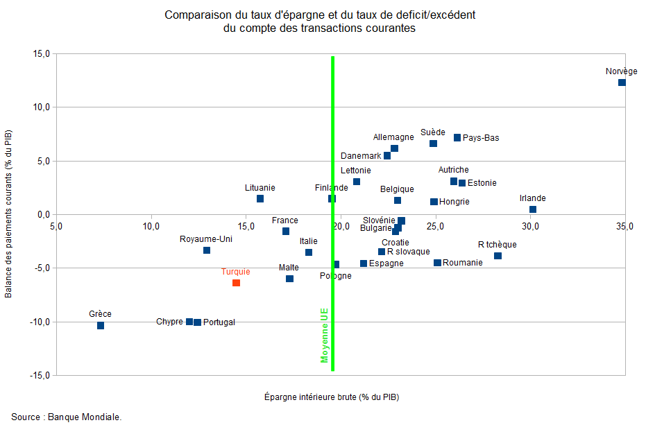 Comparaison du taux d'épargne et du taux de deficit/excédent du compte des transactions courantes - Source: Banque Mondiale